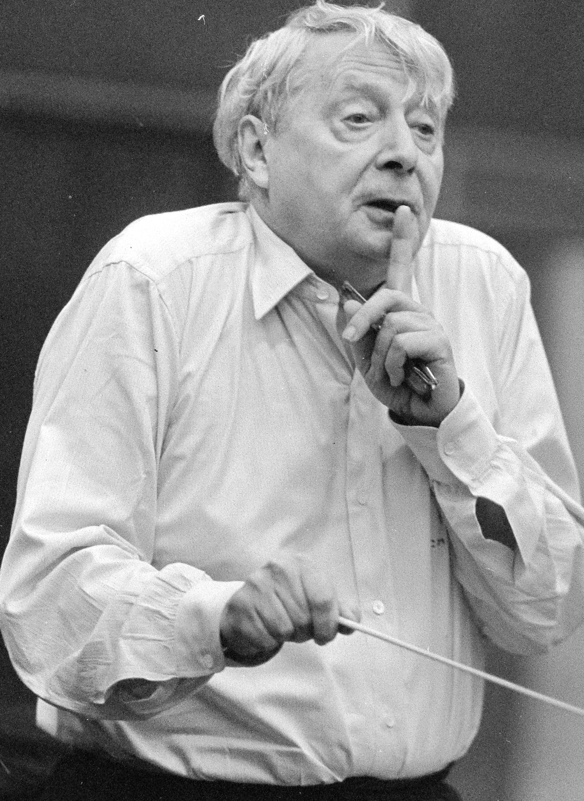 Charles Munch elzászi, német születésű karmester és hegedűművész. A francia zenekari repertoár mestere miatt a Bostoni Szimfonikus Zenekar zenei igazgatójaként ismert.